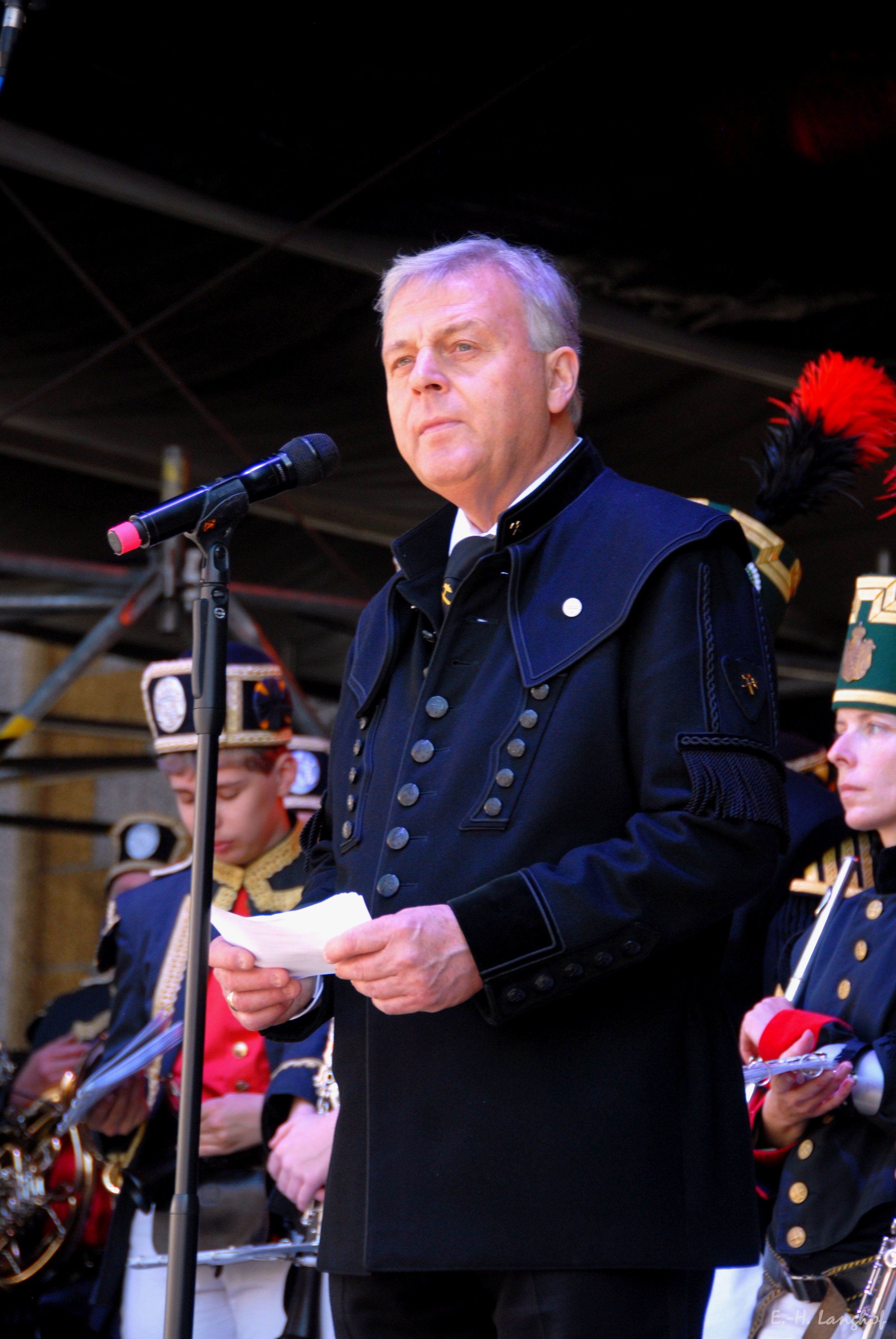 Der ehemalige Oberbürgermeister der Großen Kreisstadt Freiberg Bernd-Erwin Schramm beim Bergstadtfest 2015.